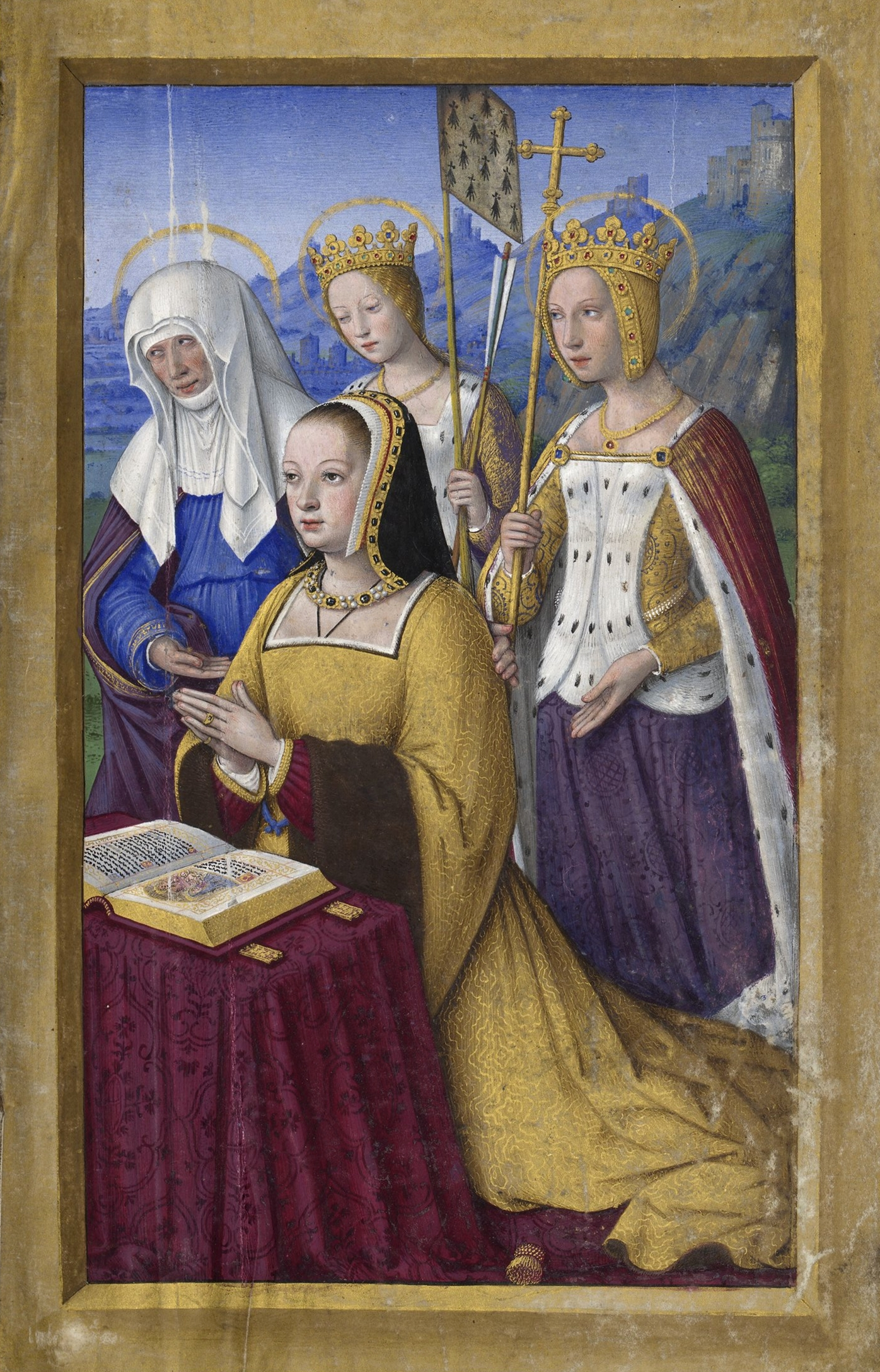 La regina Anna di Bretagna tra Sant'Anna, Sant'Orsola e Sant'Elena